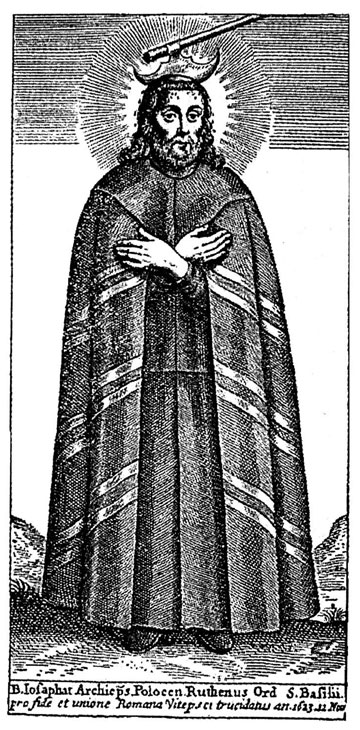 Святы (на той момант благаславёны) Язафат Кунцэвіч. Гравюра з кнігі І. Сушы «Жыццё і мучаніцтва благаславёнага Язафата Кунцэвіча». Рым, 1665 г